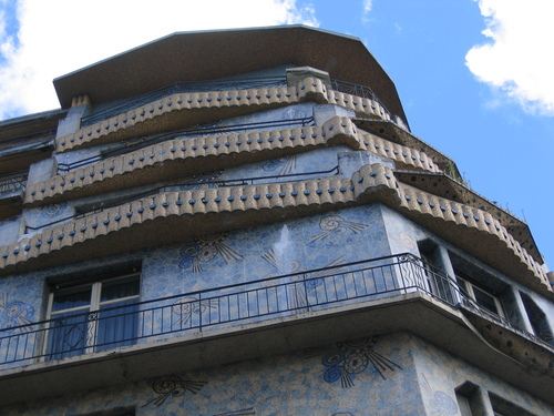 La « Maison Bleue », 25 rue d'Alsace et 10 boulevard Maréchal Foch à Angers, Maine-et-Loire, France. Immeuble construit en 1928 par l'architecte architecte Roger Jusserand.